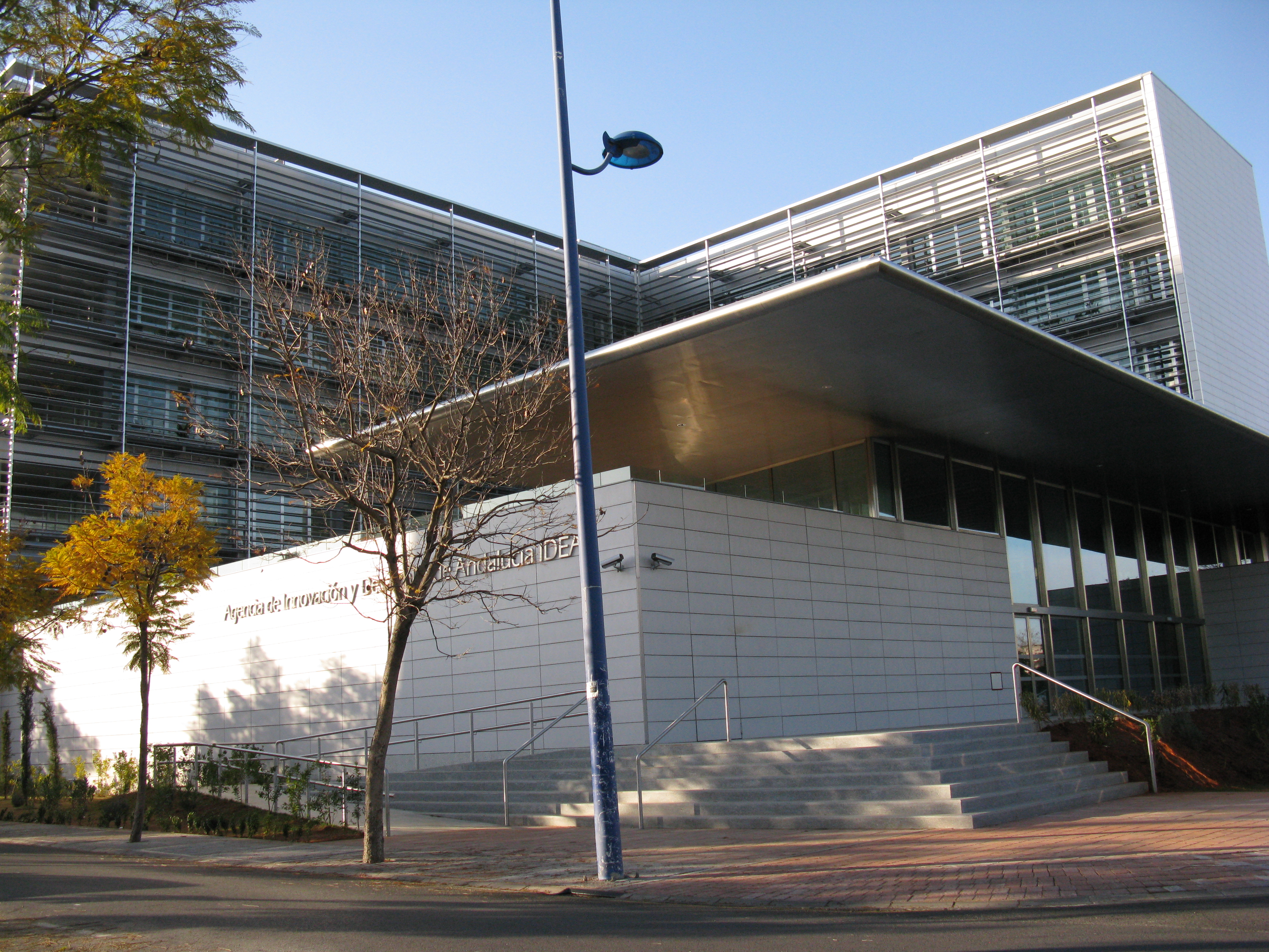 Fachada principal del edificio de la Agencia de Innovación y Desarrollo de Andalucía (IDEA), en la Isla de la Cartuja en Sevilla (España)